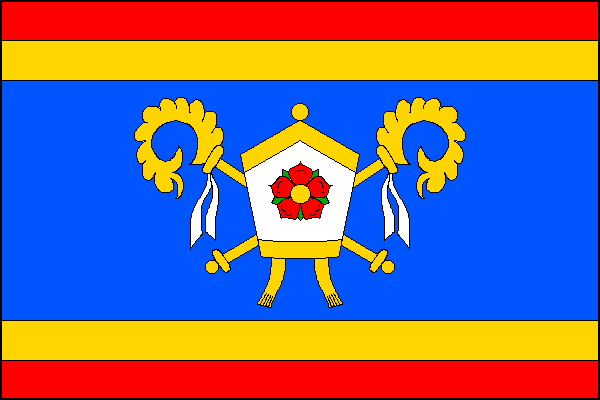 Vlajka obce Újezd, okres Zlín.